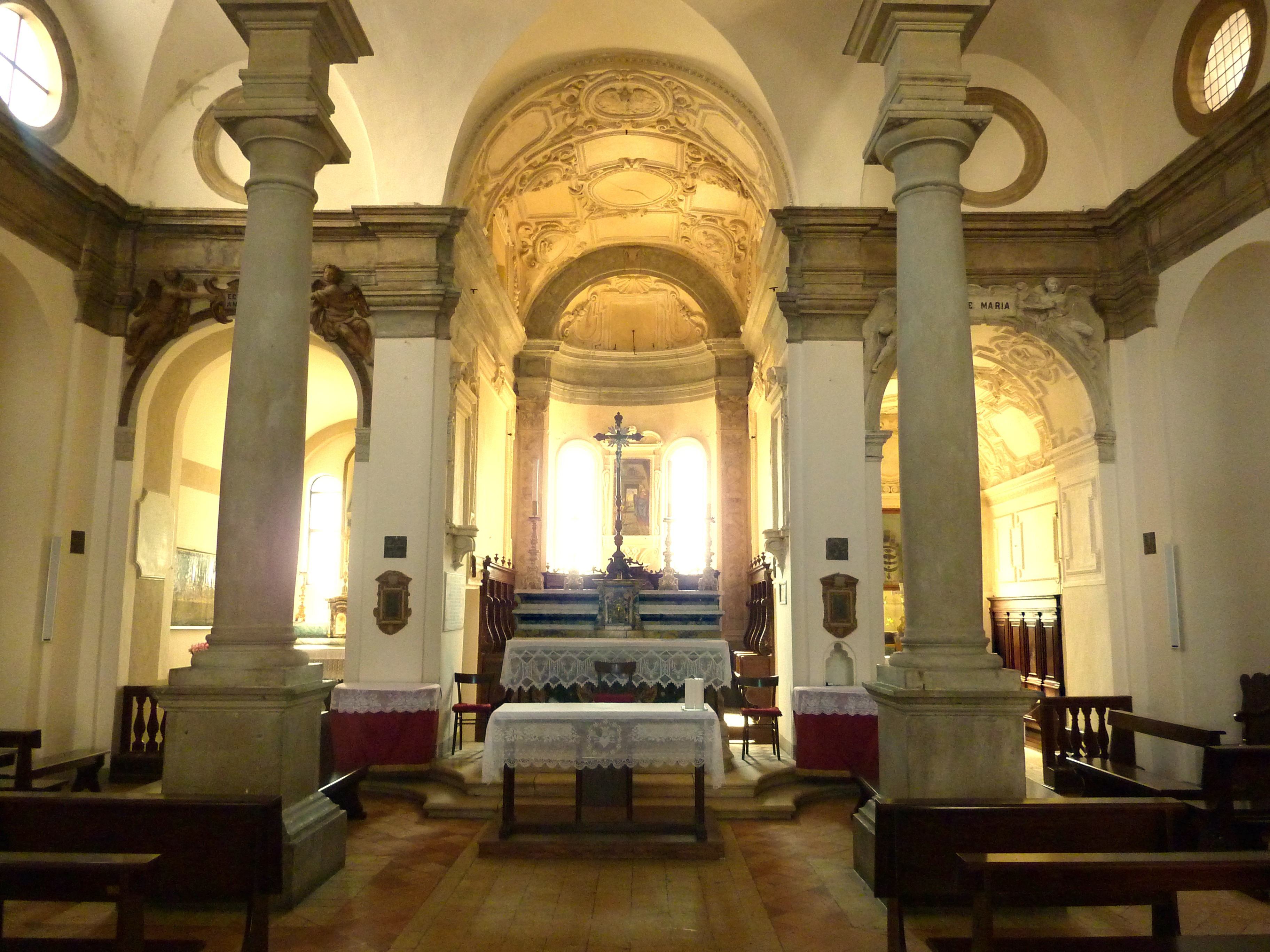 Interno della Chiesa di Santa Maria Novella di Orciano di Pesaro